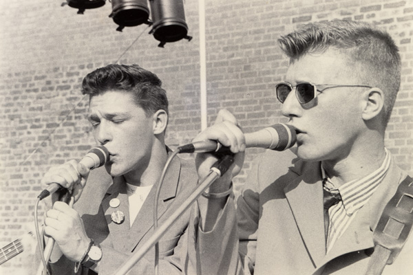 Die Jülicher Ska-Band Blue Beat auf dem Zitadelle Open Air 1987